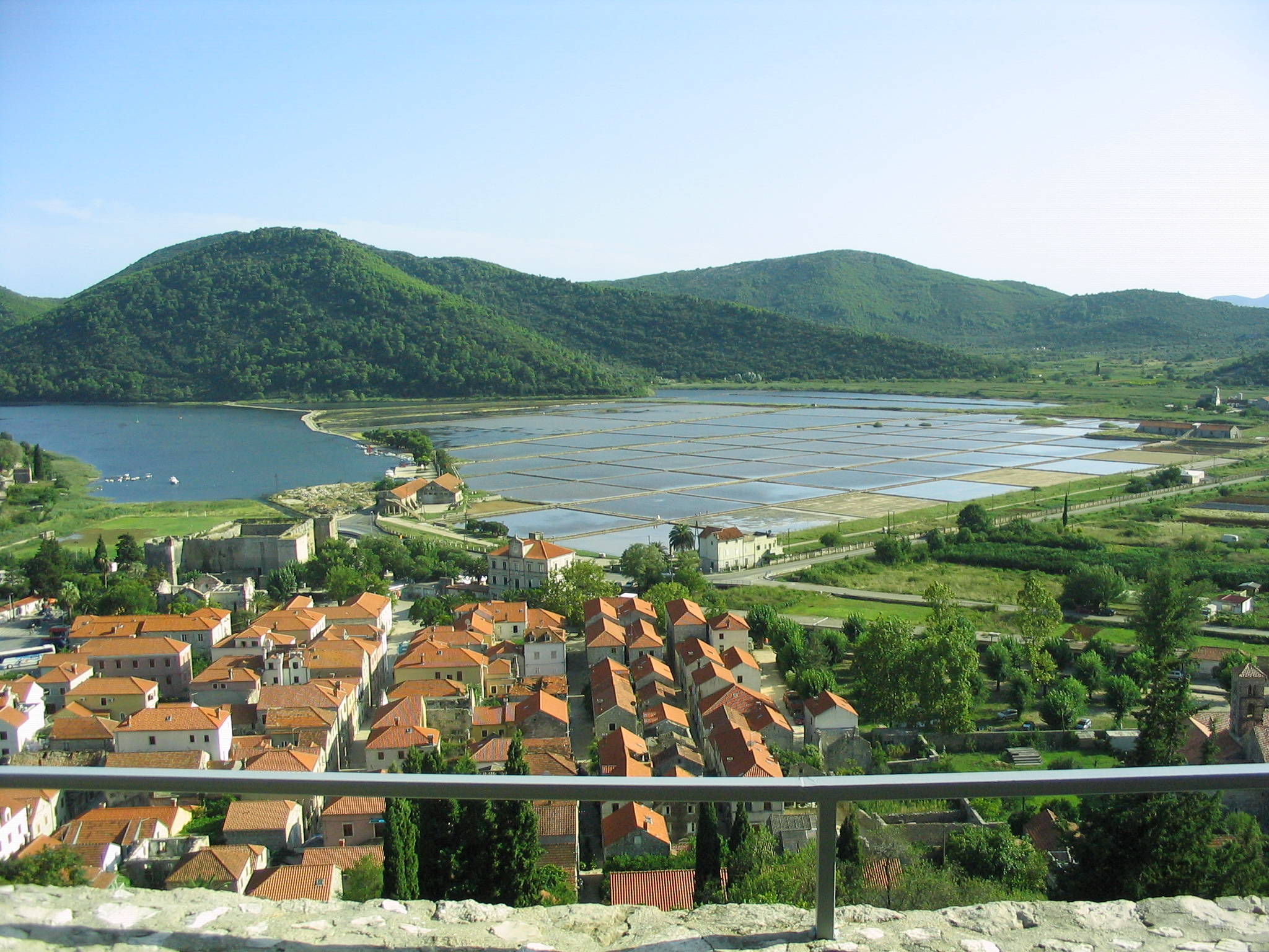 Blick von der Befestigungsanlage auf die Salinen von Mali Stone auf der Halbinsel Pelješac, Aufgenommen von Dr. Hagen Graebner am 21.08.2006